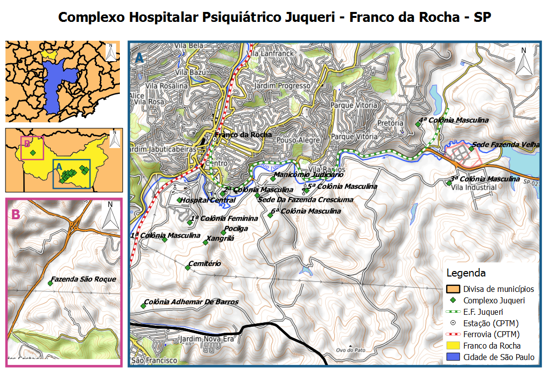 Mapa com a localização das alas do Complexo Hospitalar Psiquiátrico Juqueri e da Fazenda São Roque em Franco Da Rocha, São Paulo.